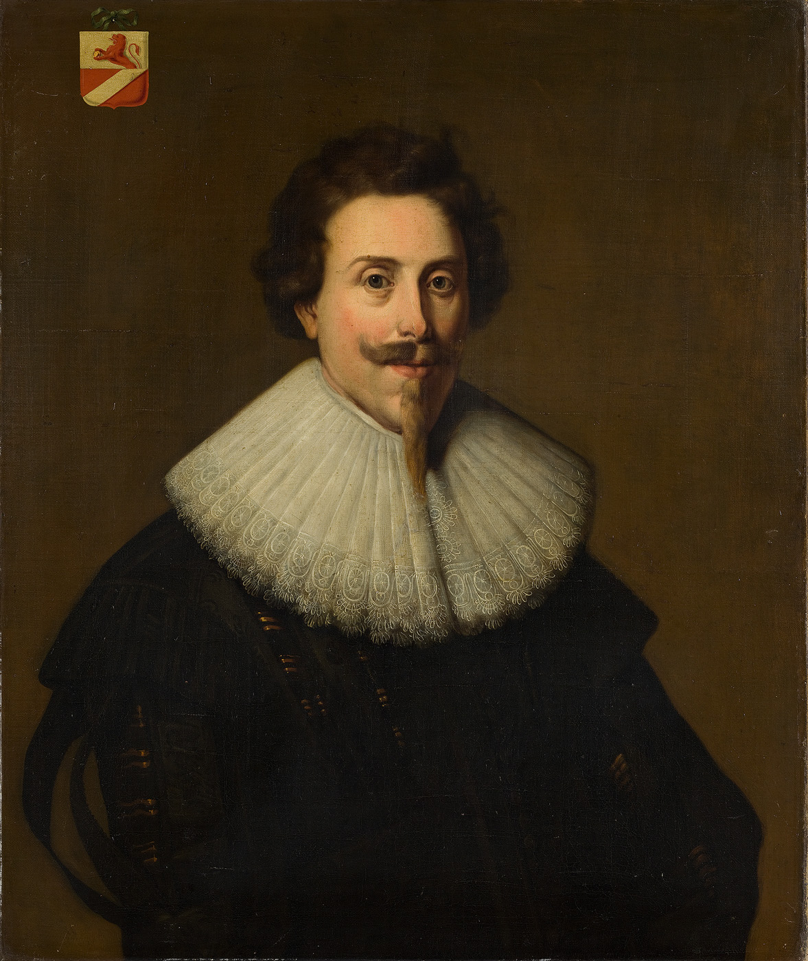 schilderij; burgemeester van Amsterdam; heraldiek; Backer, Willem; portret; portret Amsterdam; mansportret; Backer, Willem